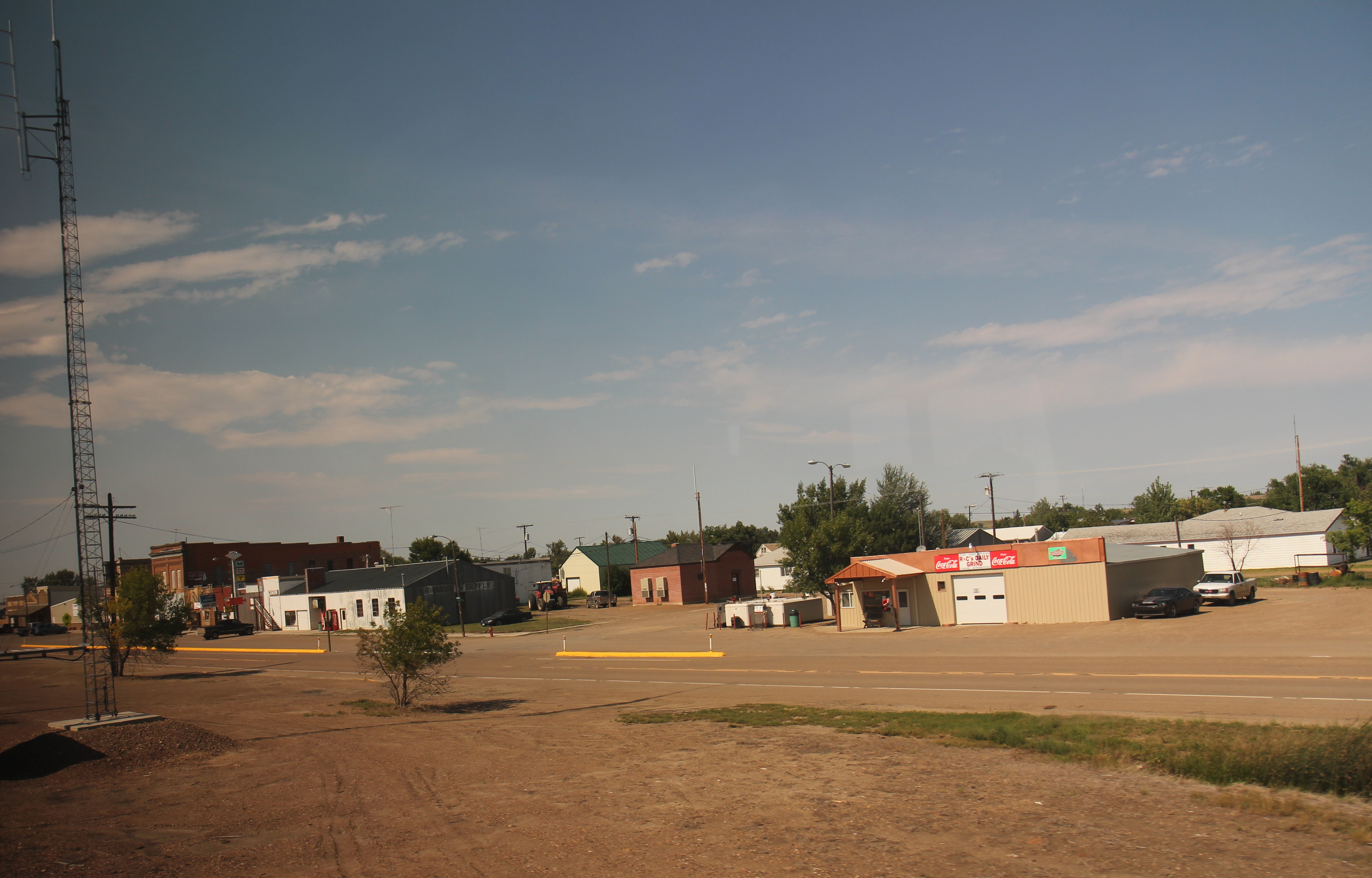 A panorama of Saco, Montana.